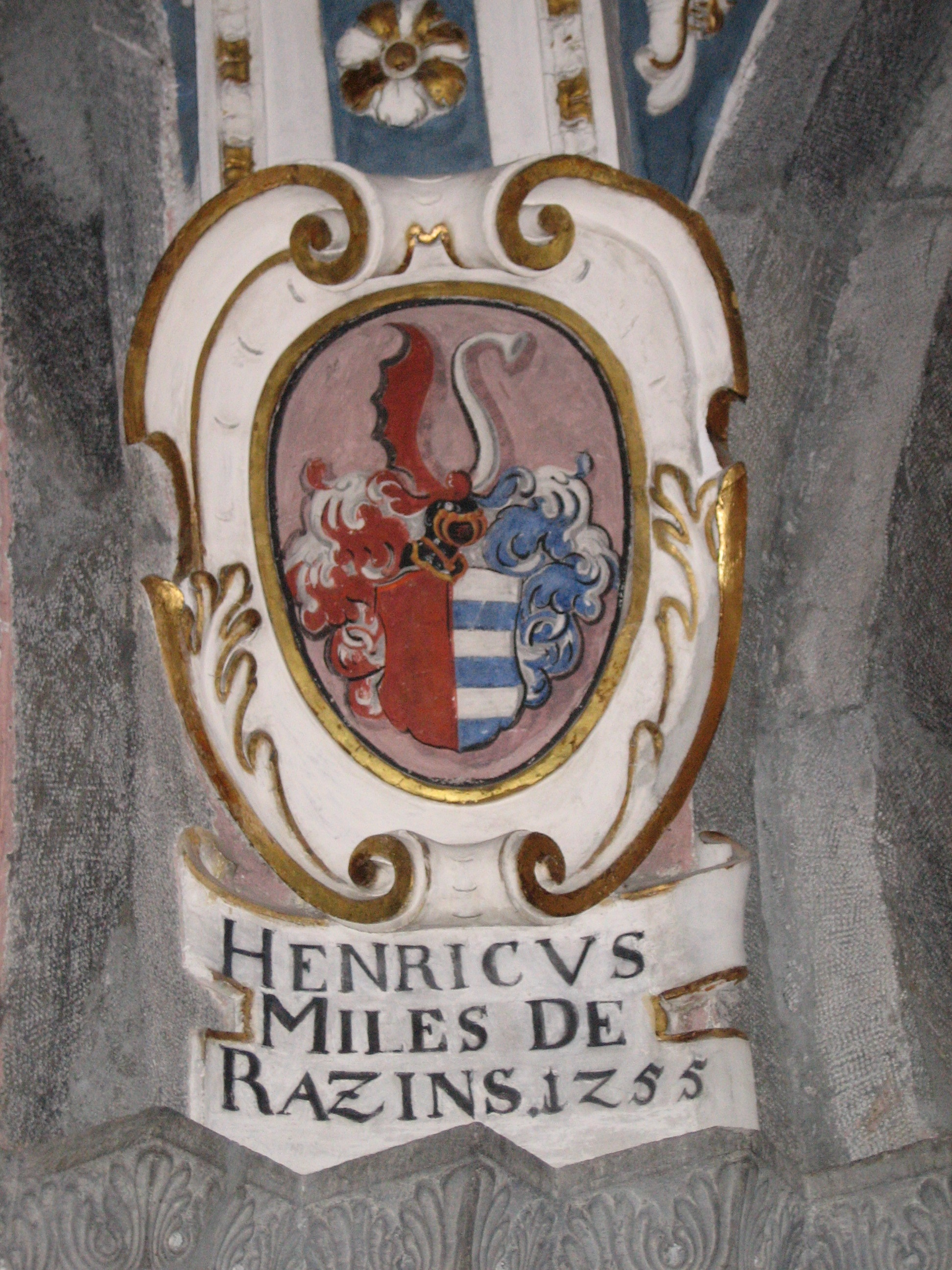 Wappen von Heinrich von Rhäzüns in der Kathedrale von Chur